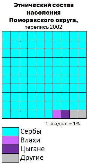 Этнический состав населения Поморавского округа (Сербия)